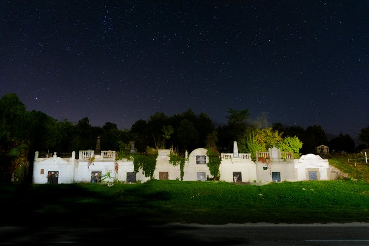 1800-as években épült kripták, Balatonfőkajár